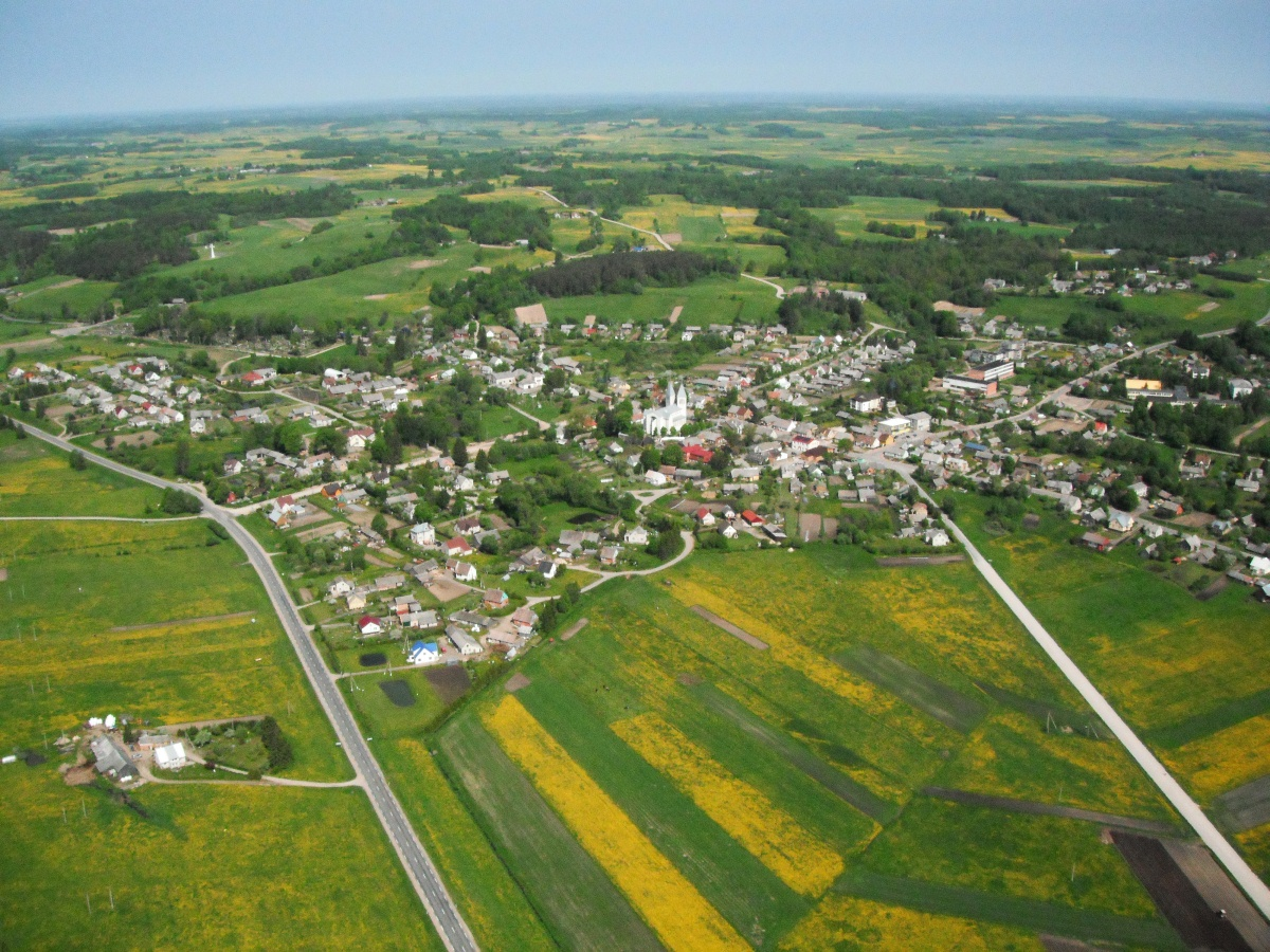 Kaltinėnai.Vaizdas iš viršaus